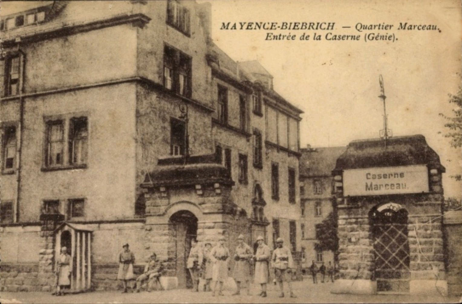 Mudra - Kaserne Mainz-Kastel, französische Besetzung nach dem 1. Weltkrieg